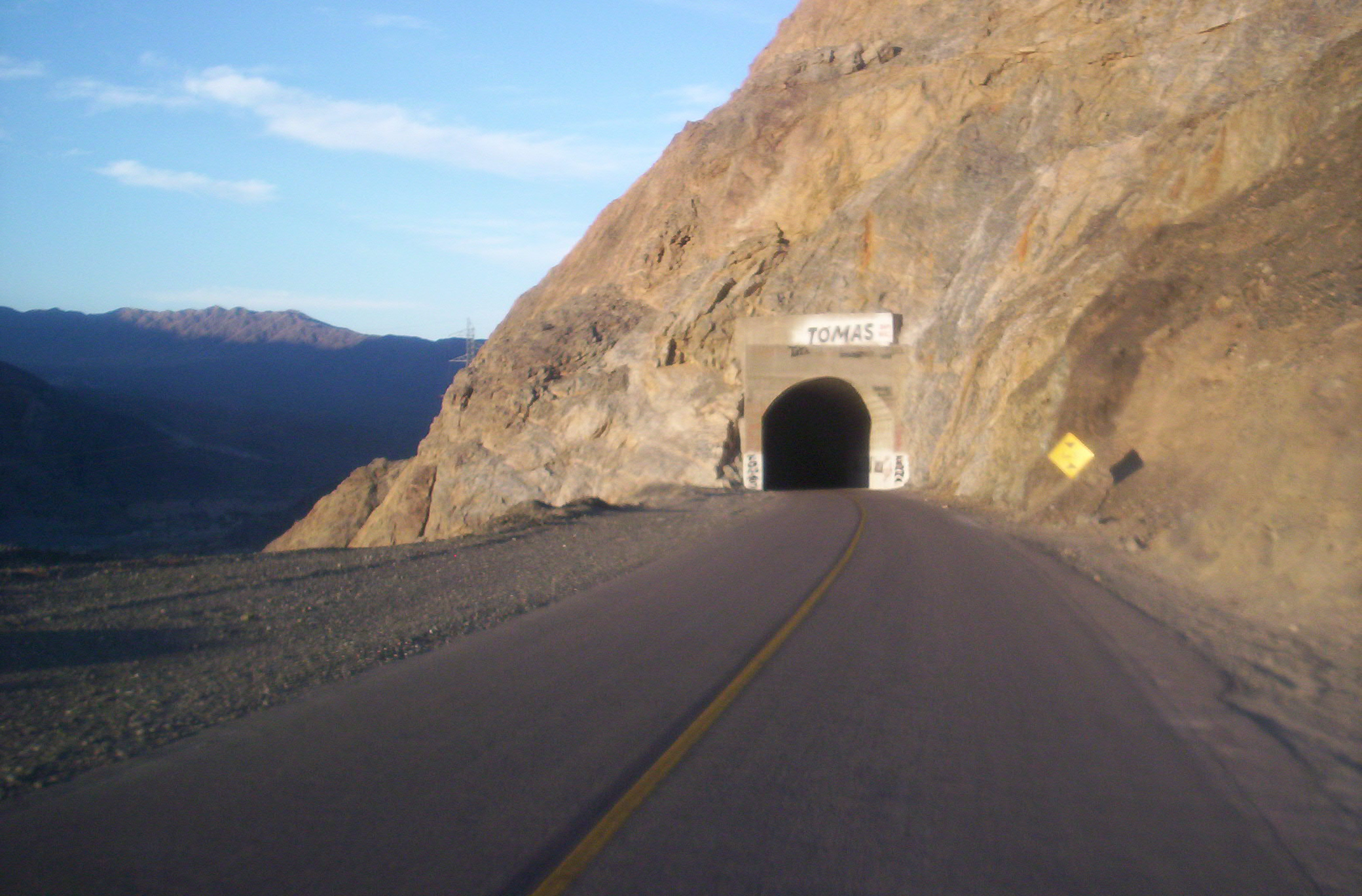 Tunel de la Ruta Nacional 150 , trama Rodeo - San José de Jáchal, provincia de San Juan, Argentina.